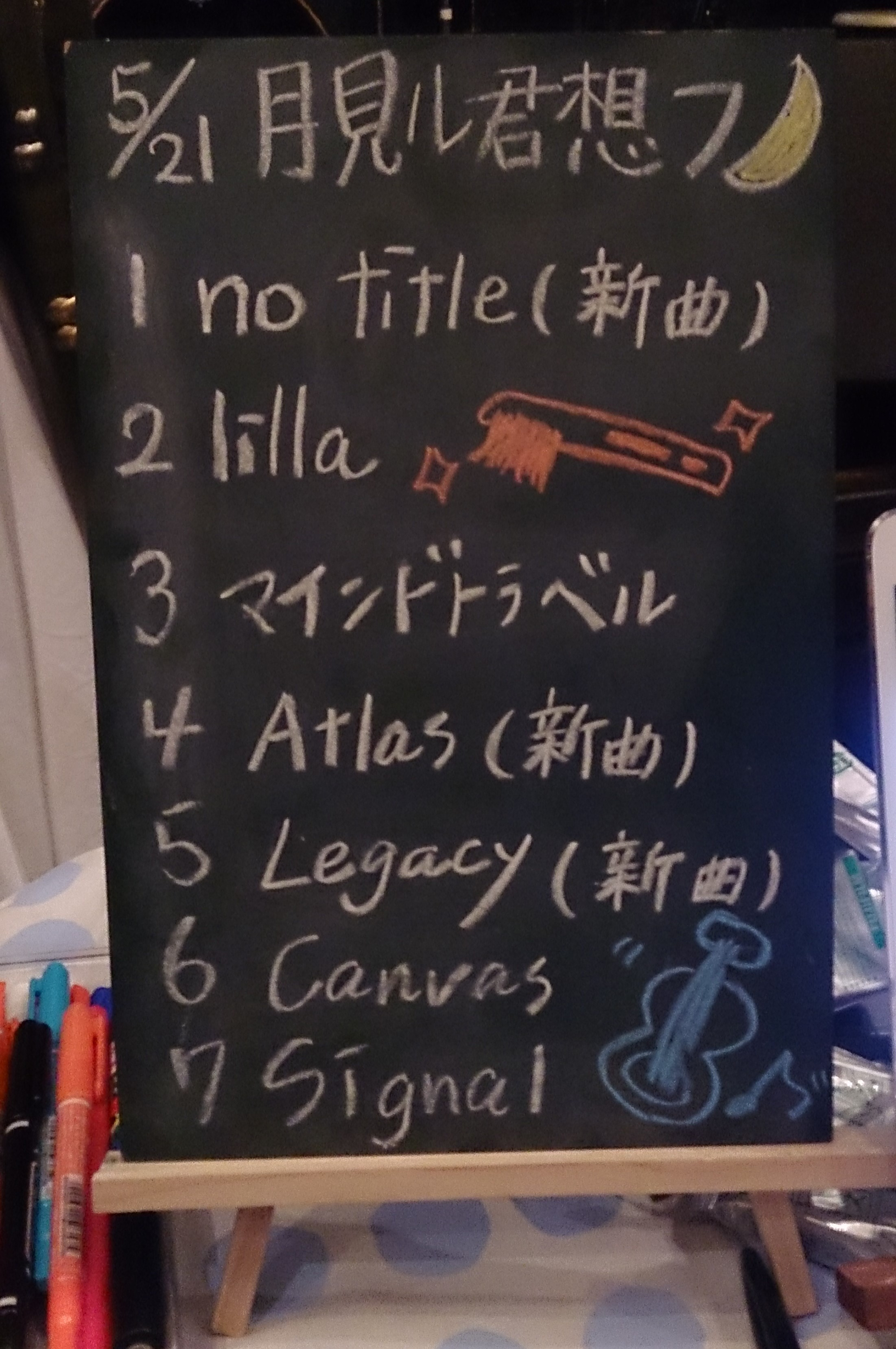 amiinAセトリボード(20160521(1))